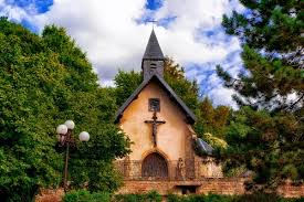 Chapelle